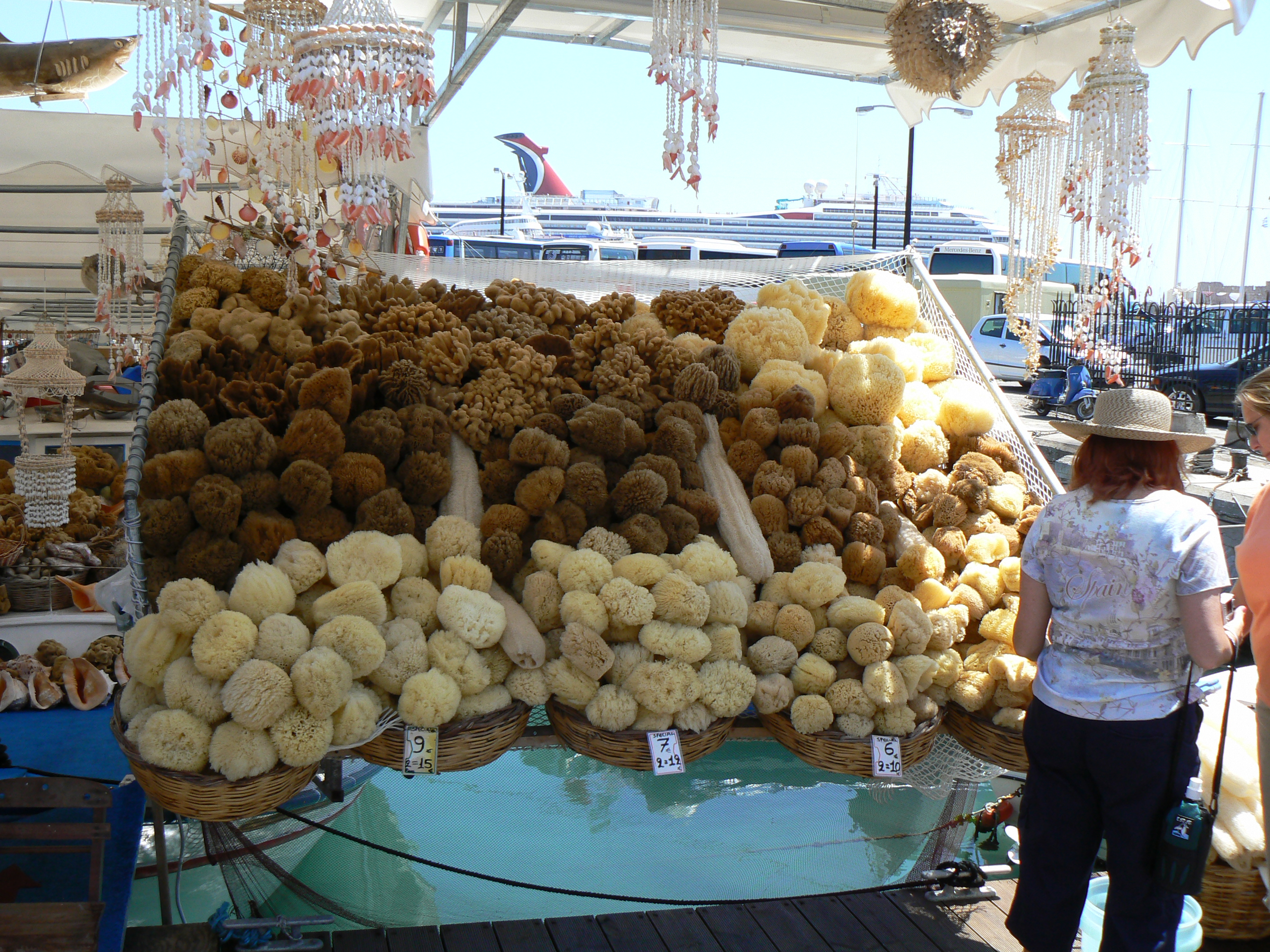 frames 2007 favs europe